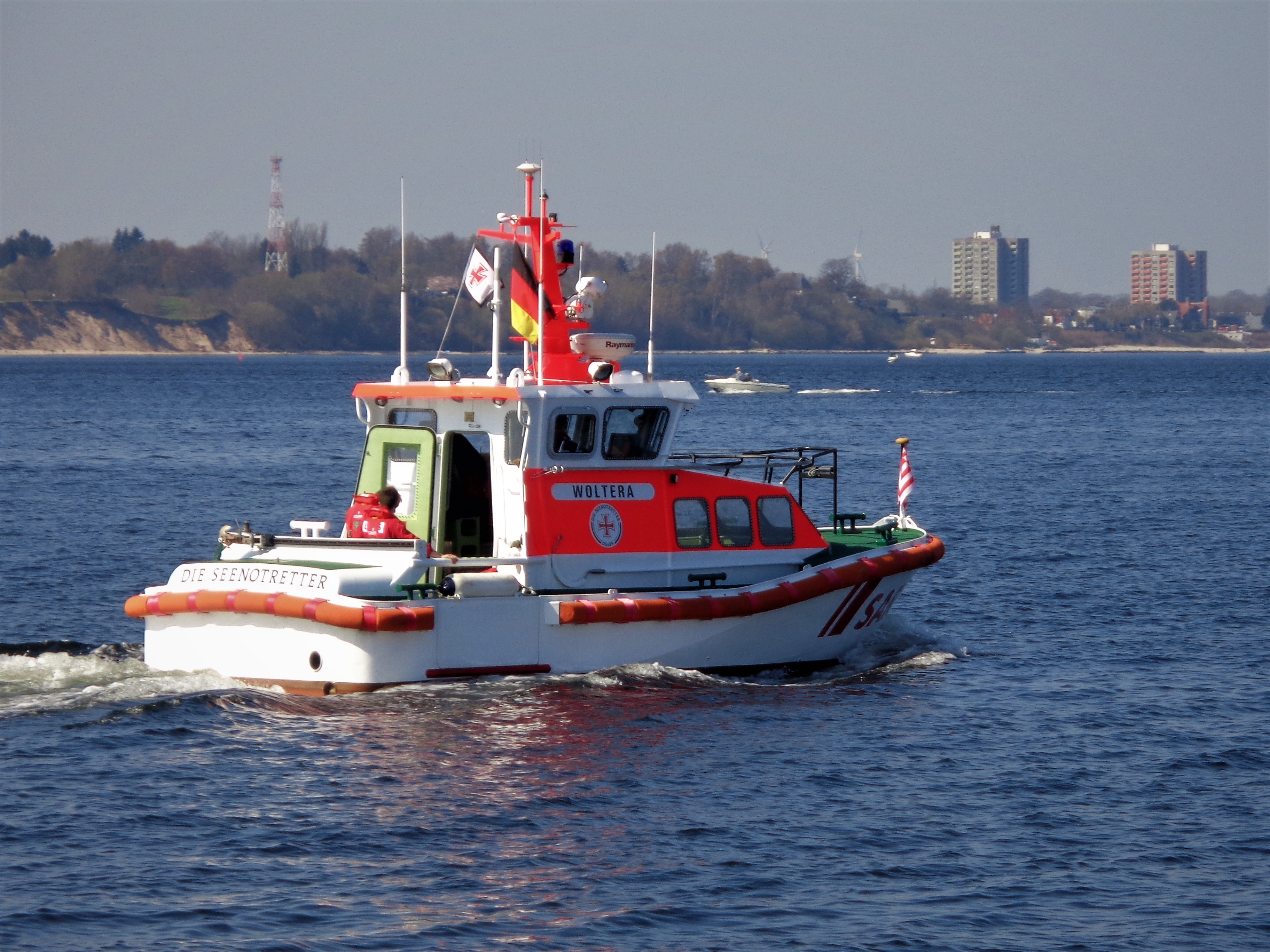 Das DGzRS-Schiff "Woltera" vor dem Laboer Hafen.